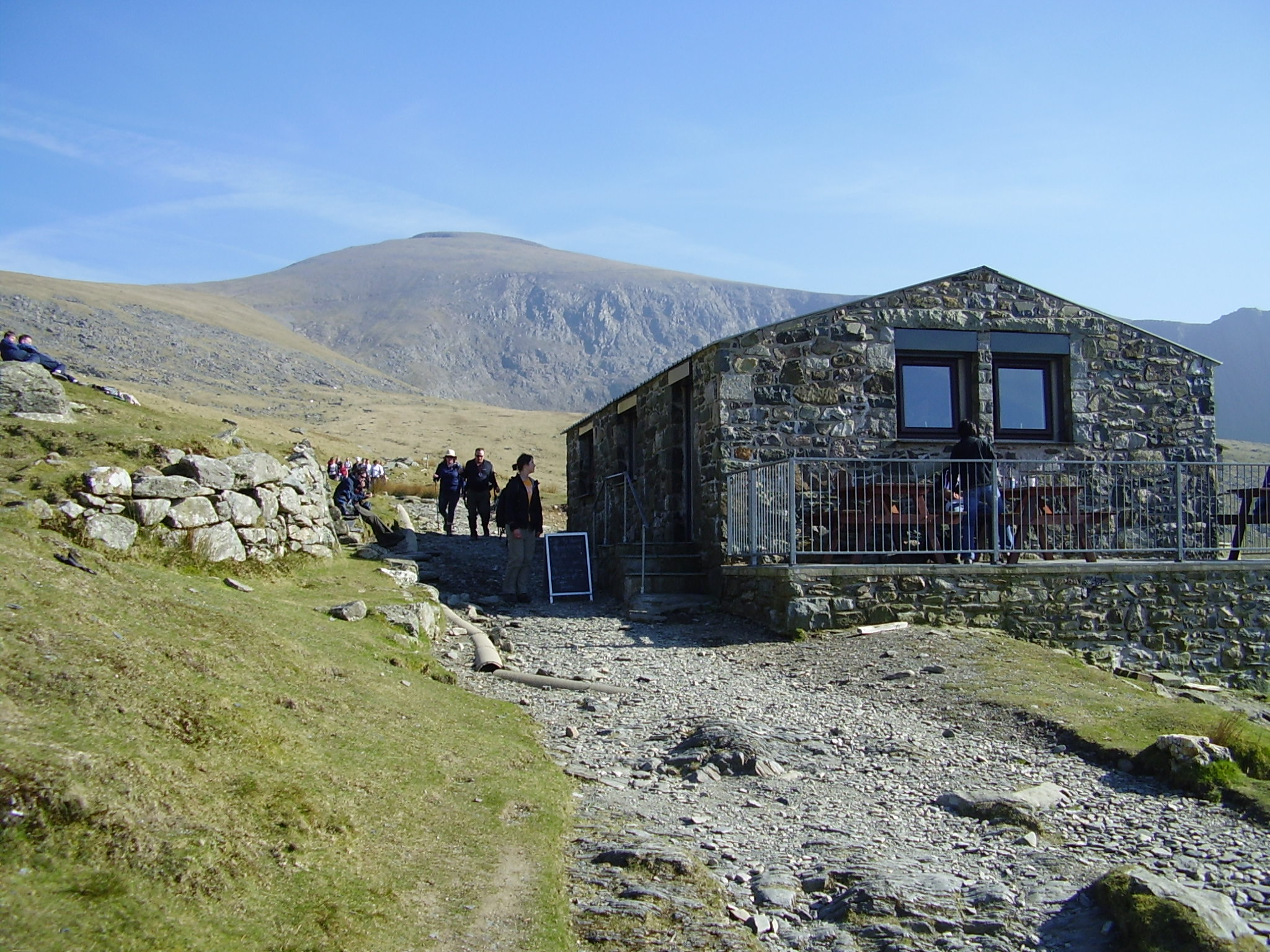 Chata pod horou Snowdon